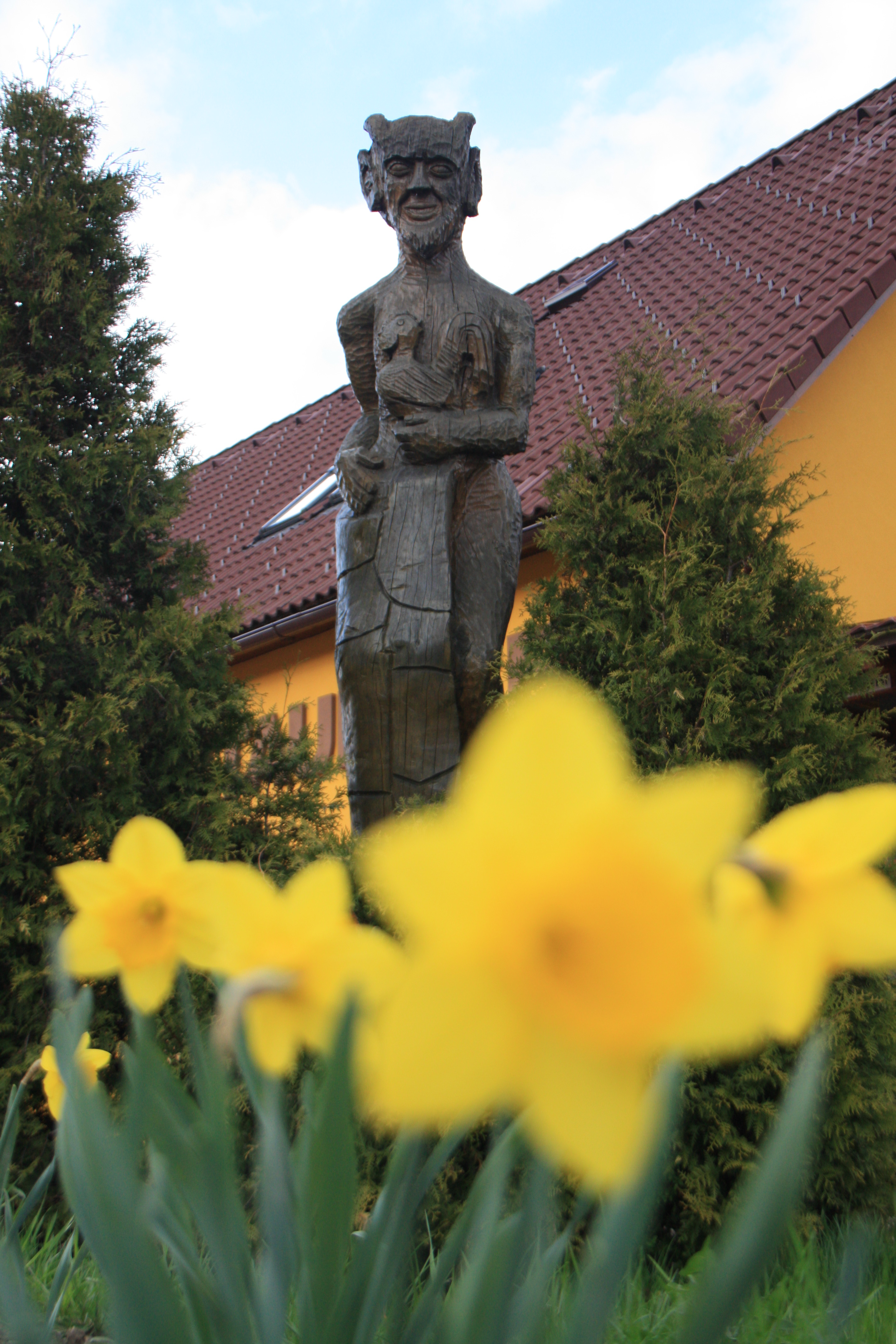 Czort autorstwa Jana Brlicy młodszego